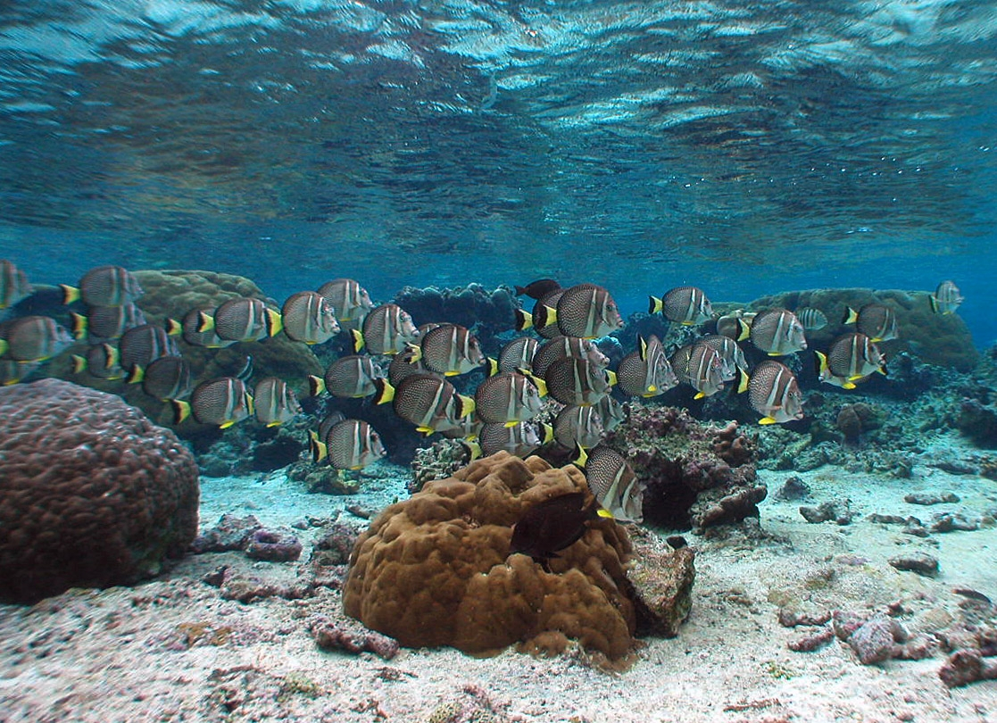 A. guttatus en el Parque Nacional de Samoa Americana